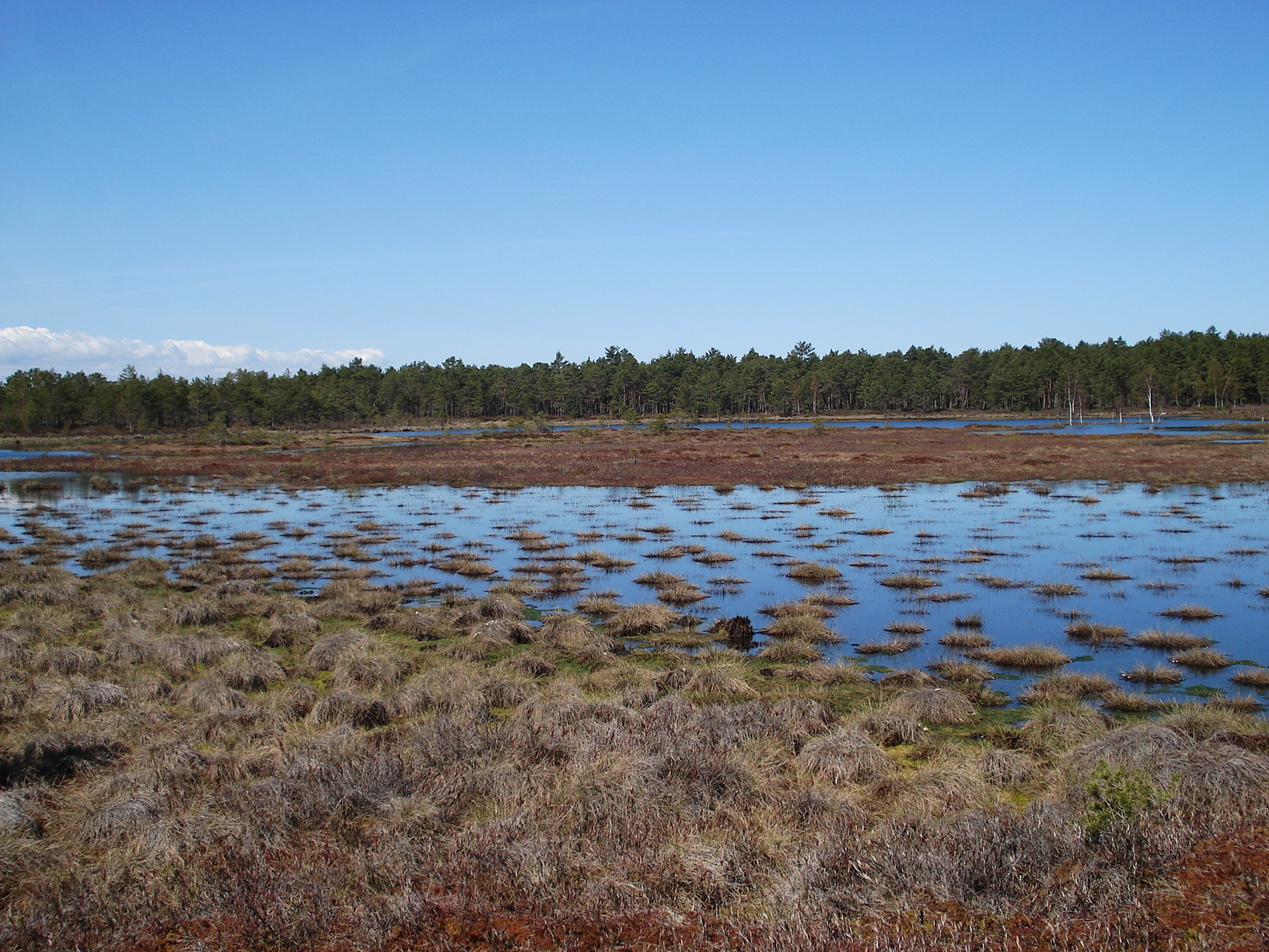 Putnezers Raganu purvā